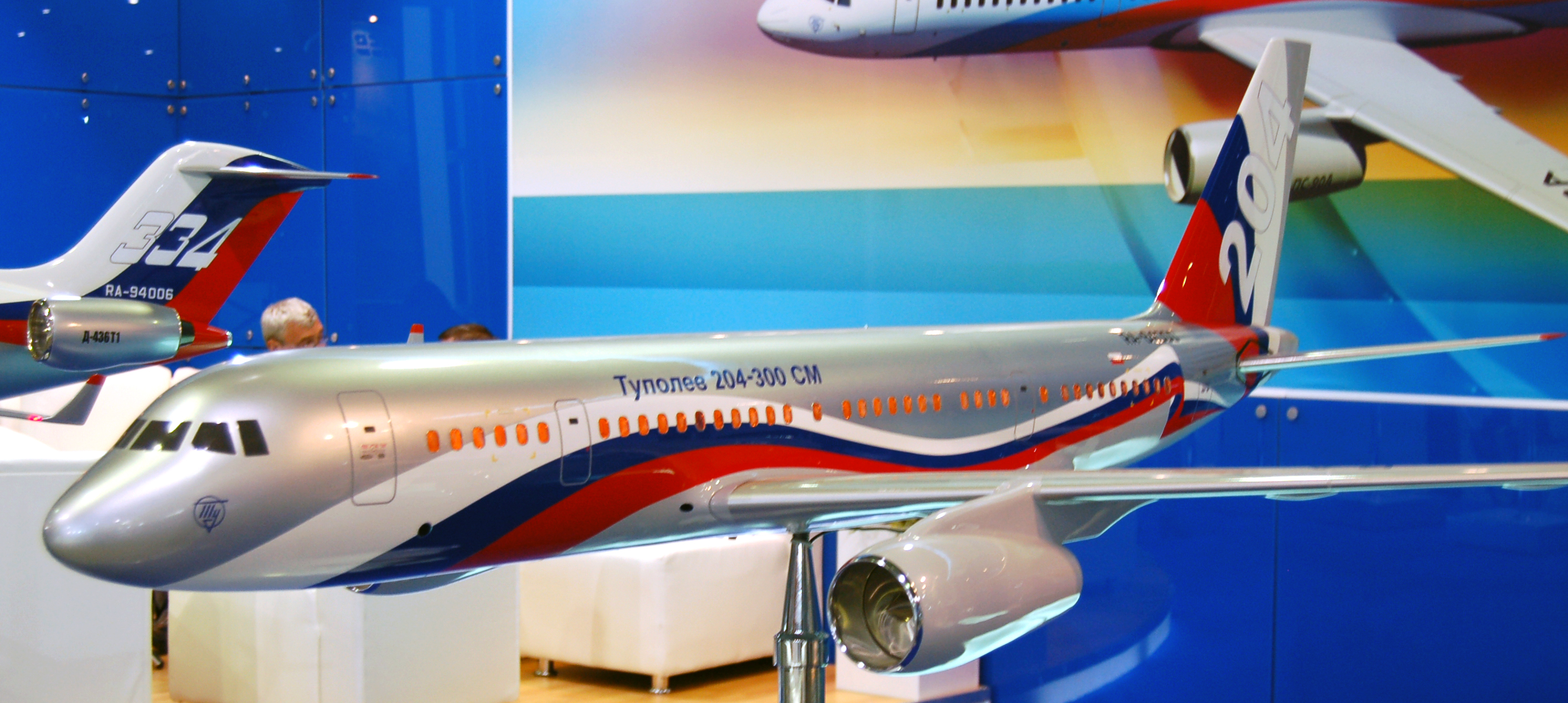 Макет самолёта Ту-204СМ. МАКС-2009